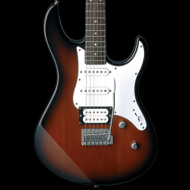 Yamaha Pacífica 112V